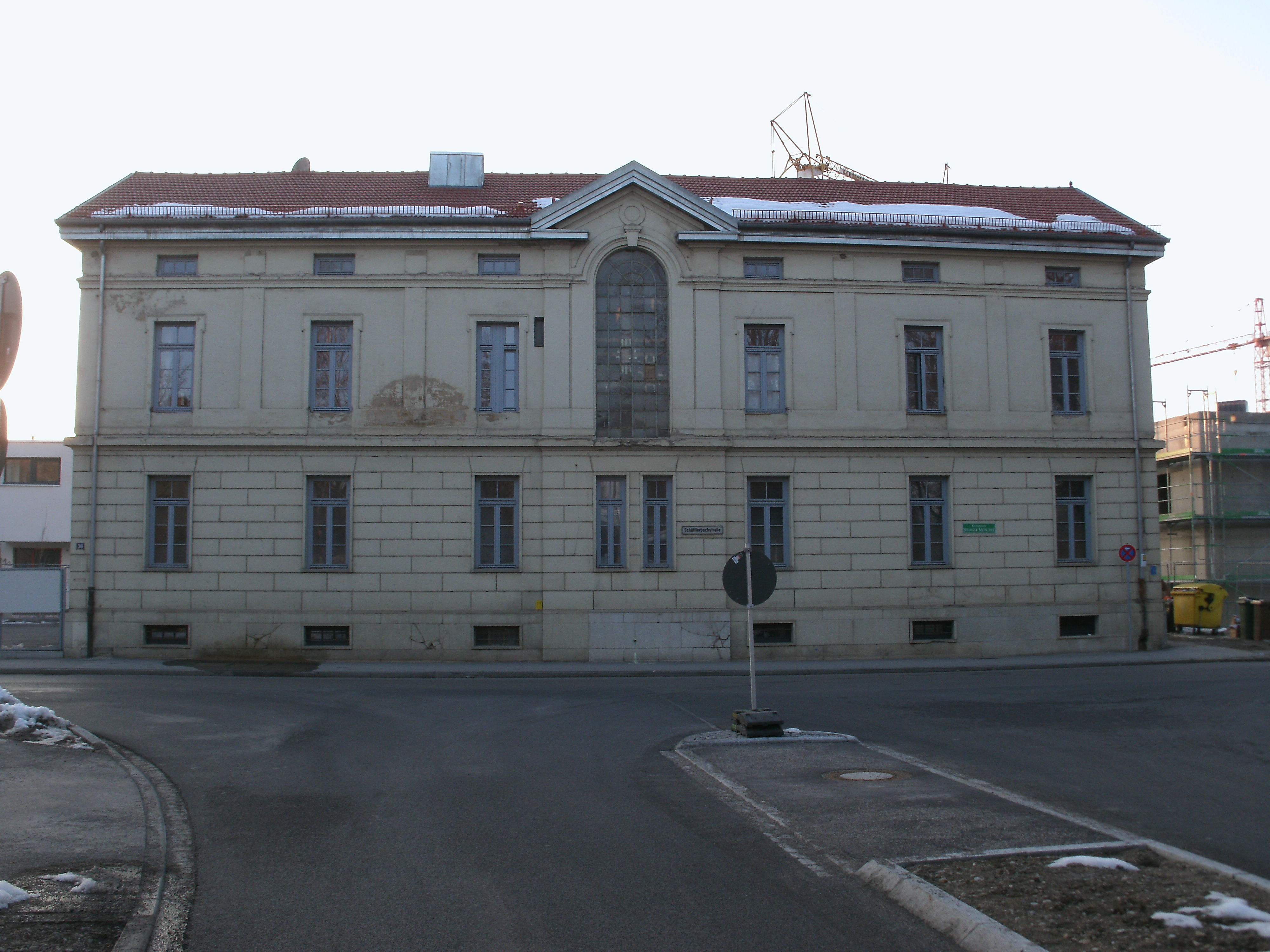 Augsburg, Schäfflerbachstraße 30 (Ehem. Wasch- und Badehaus der Arbeitersiedlung der Kammgarnspinnerei ("Kammgarnquartier") )